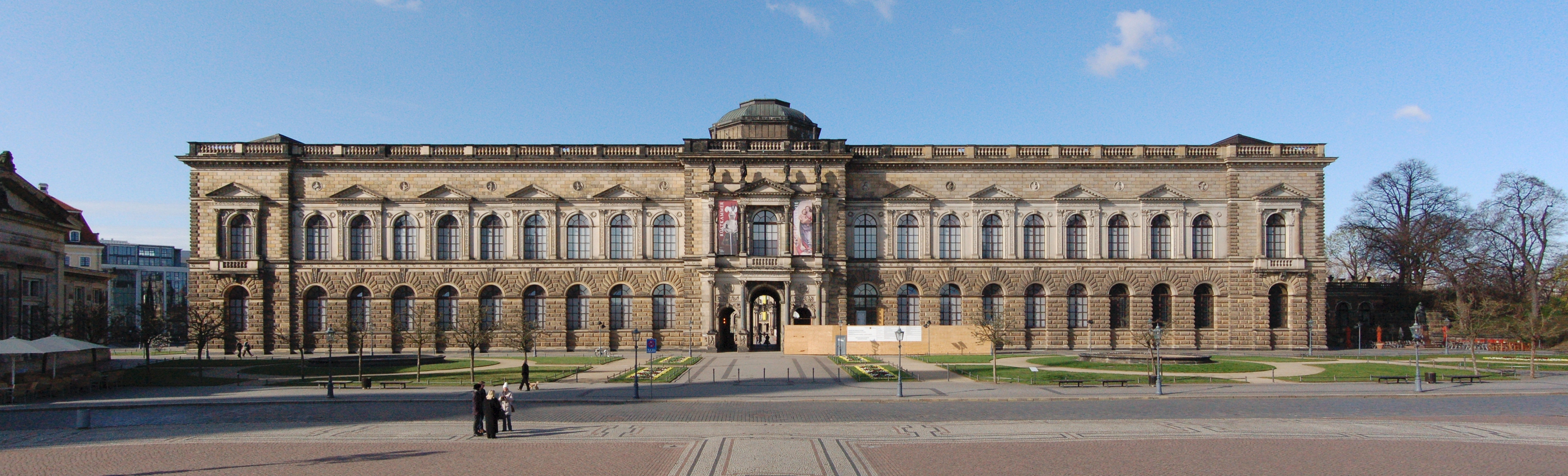 Blick von Theaterplatz auf die Sempergalerie des "Zwingers" in Dresden.